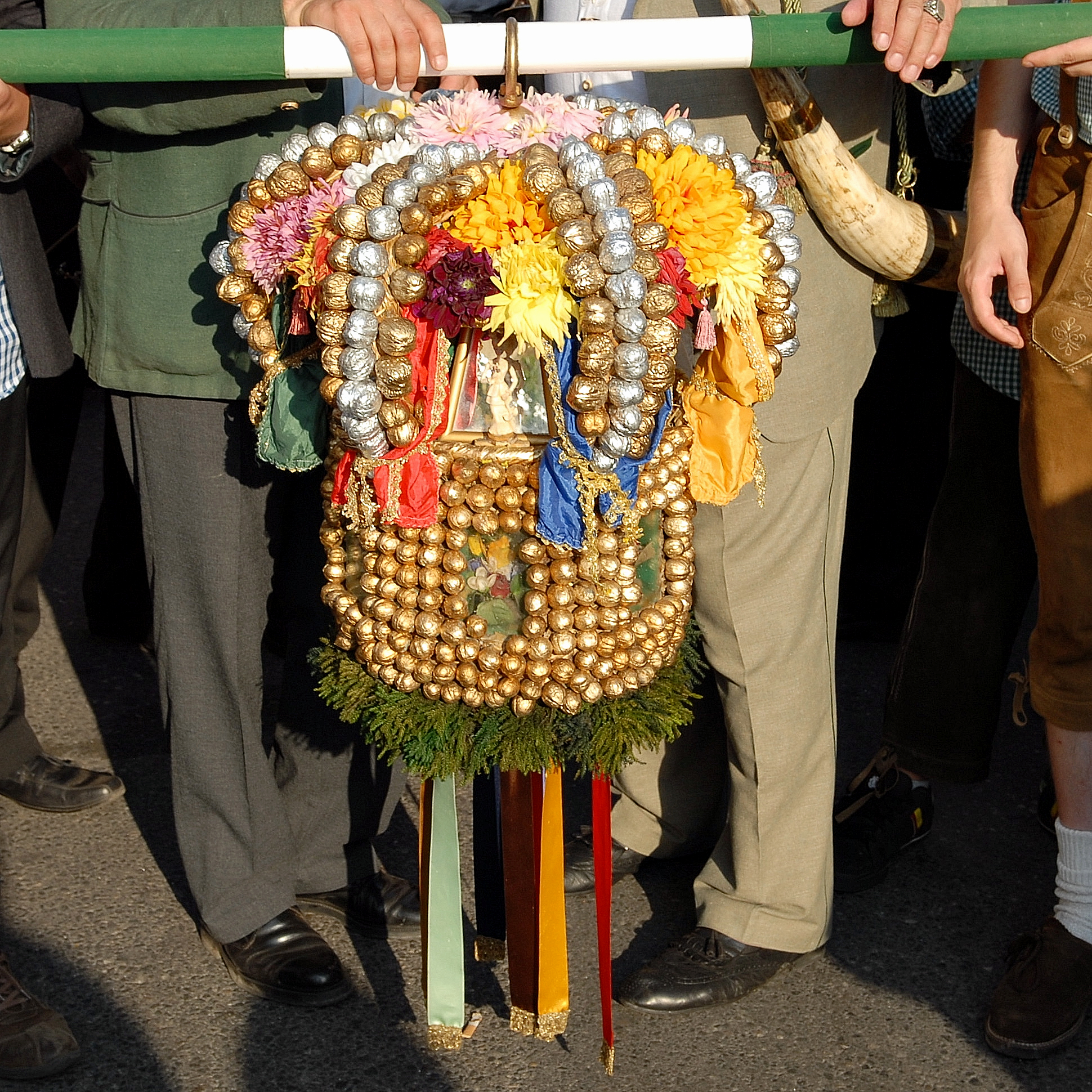 Neustifter Hauerkrone, 2011